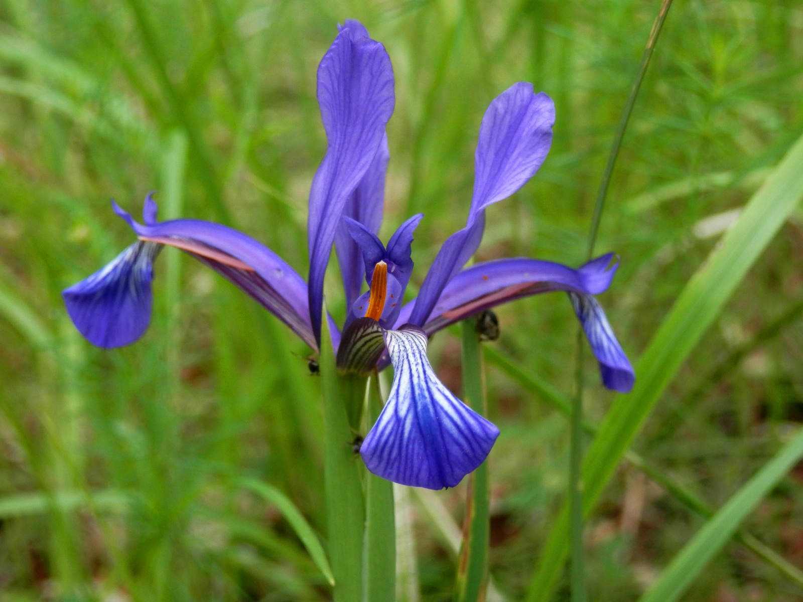 Странджа, Синтенисова перуника (Iris sintenisii)